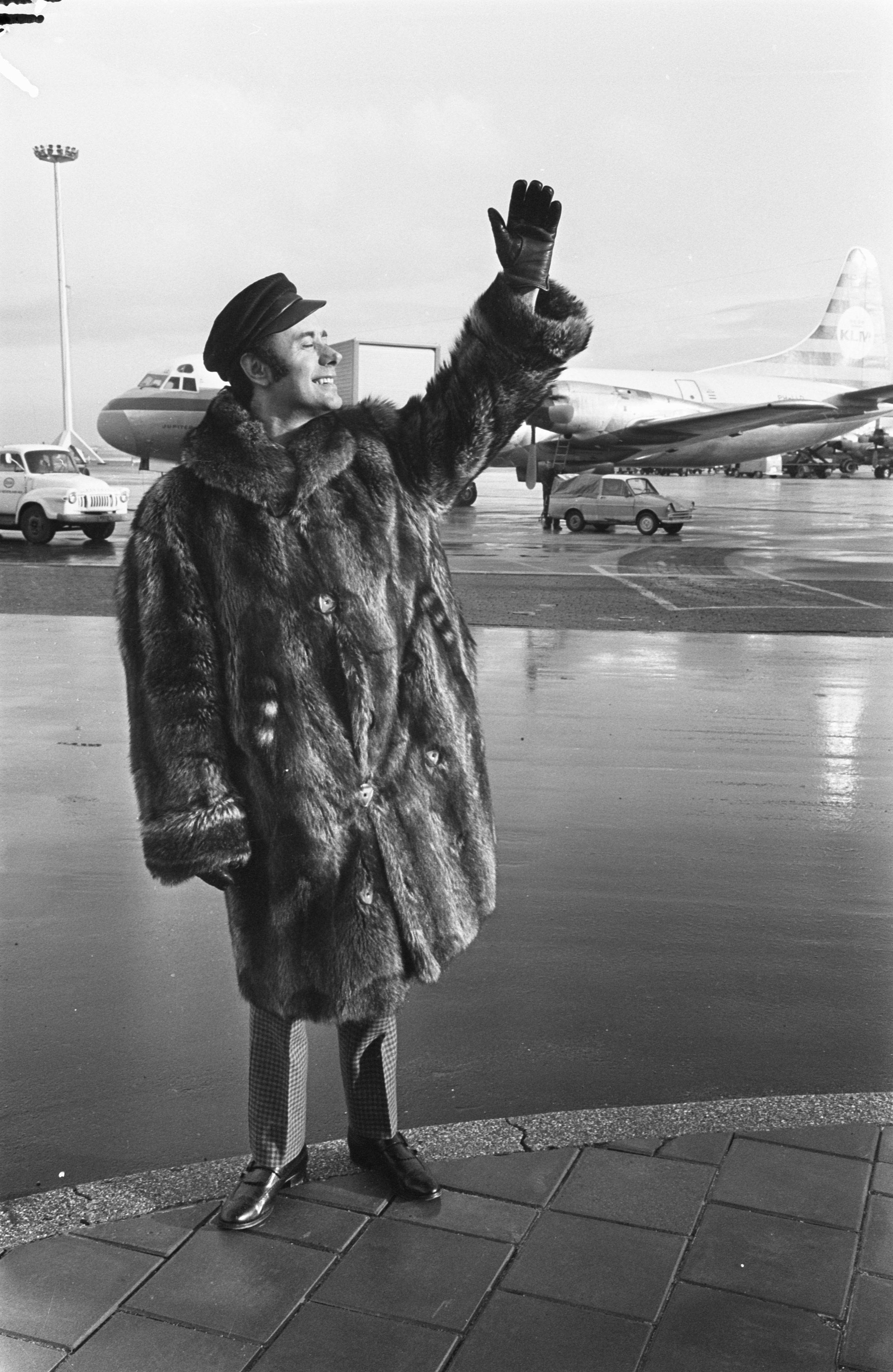 Collectie / Archief : Fotocollectie Anefo Reportage / Serie : [ onbekend ] Beschrijving : Opdracht Telegraaf. Victor Spinnetti aankomst Schiphol Annotatie : Acteur Victor Spinetti was in Nederland ter gelegenheid van de opening van de nieuwe filmzaal van het Concerthuis in Groningen met de vertoning van de film 'De getemde feeks' waarin hij in de rol van Hortensio naast medespeler van Liz Taylor was. Datum : 20 december 1967 Locatie : Noord-Holland, Schiphol Trefwoorden : acteurs, filmsterren, vliegvelden Persoonsnaam : Spinetti, Victor Fotograaf : Koch, Eric / Anefo Auteursrechthebbende : Nationaal Archief Materiaalsoort : Negatief (zwart/wit) Nummer archiefinventaris : bekijk toegang 2.24.01.05 Bestanddeelnummer : 920-9416